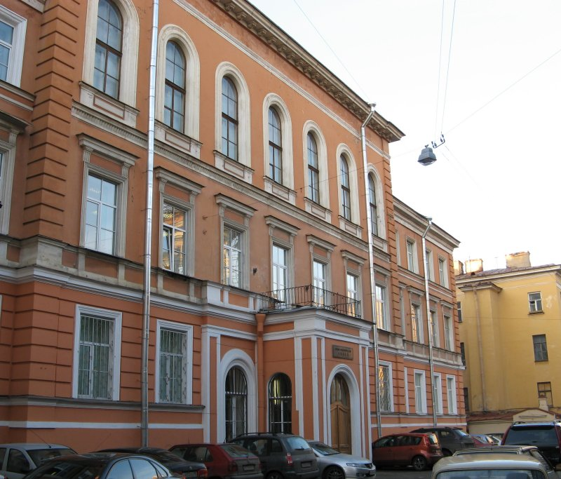 Физико-математический лицей № 239/Saint Petersburg Lyceum 239